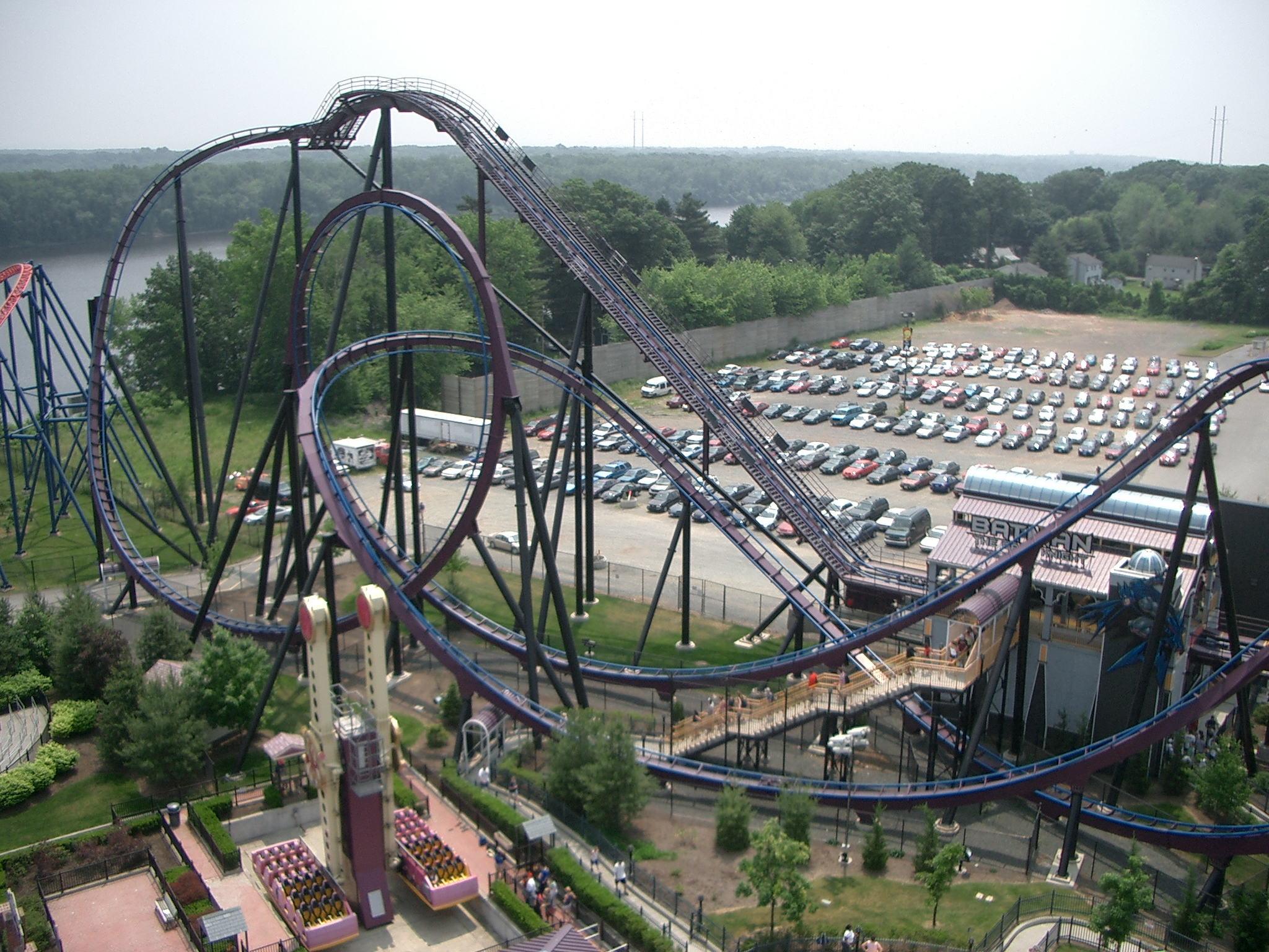 Batman SFNE